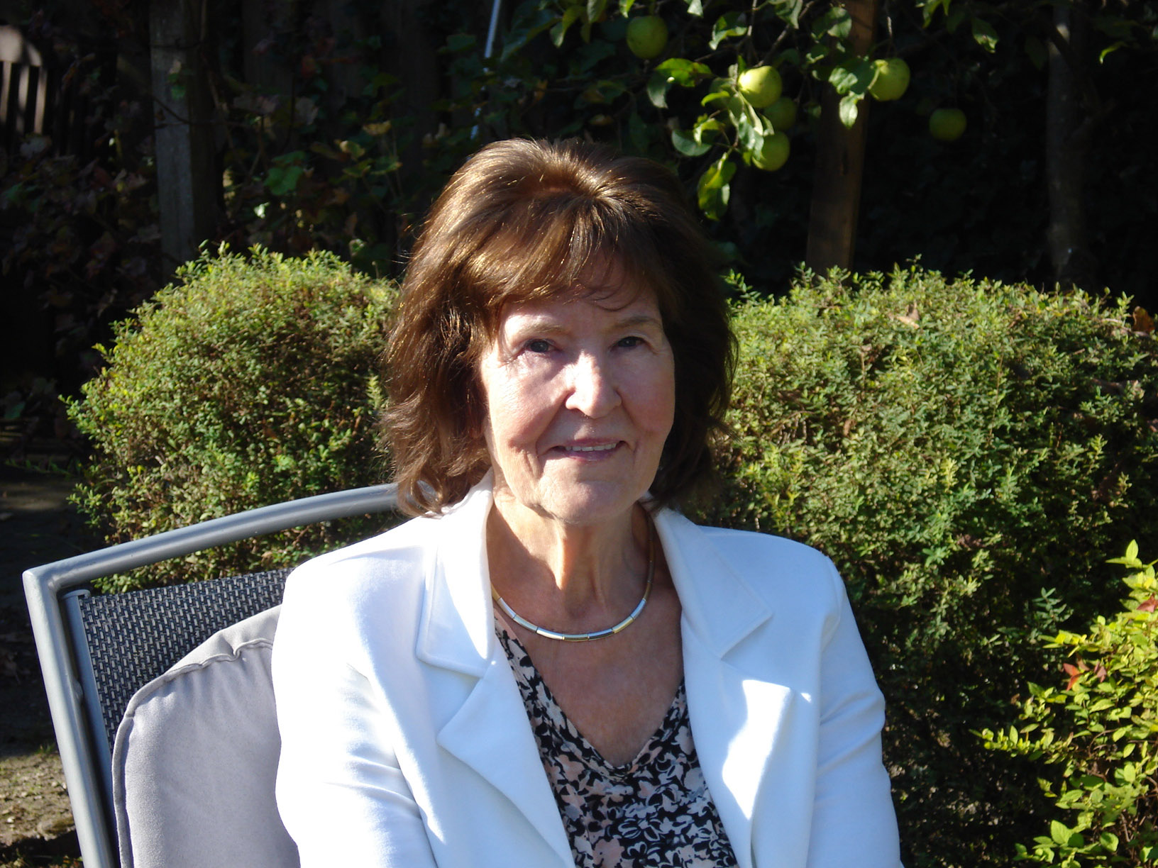 Catharina Boer (1939), Nederlands dichter en schrijfster